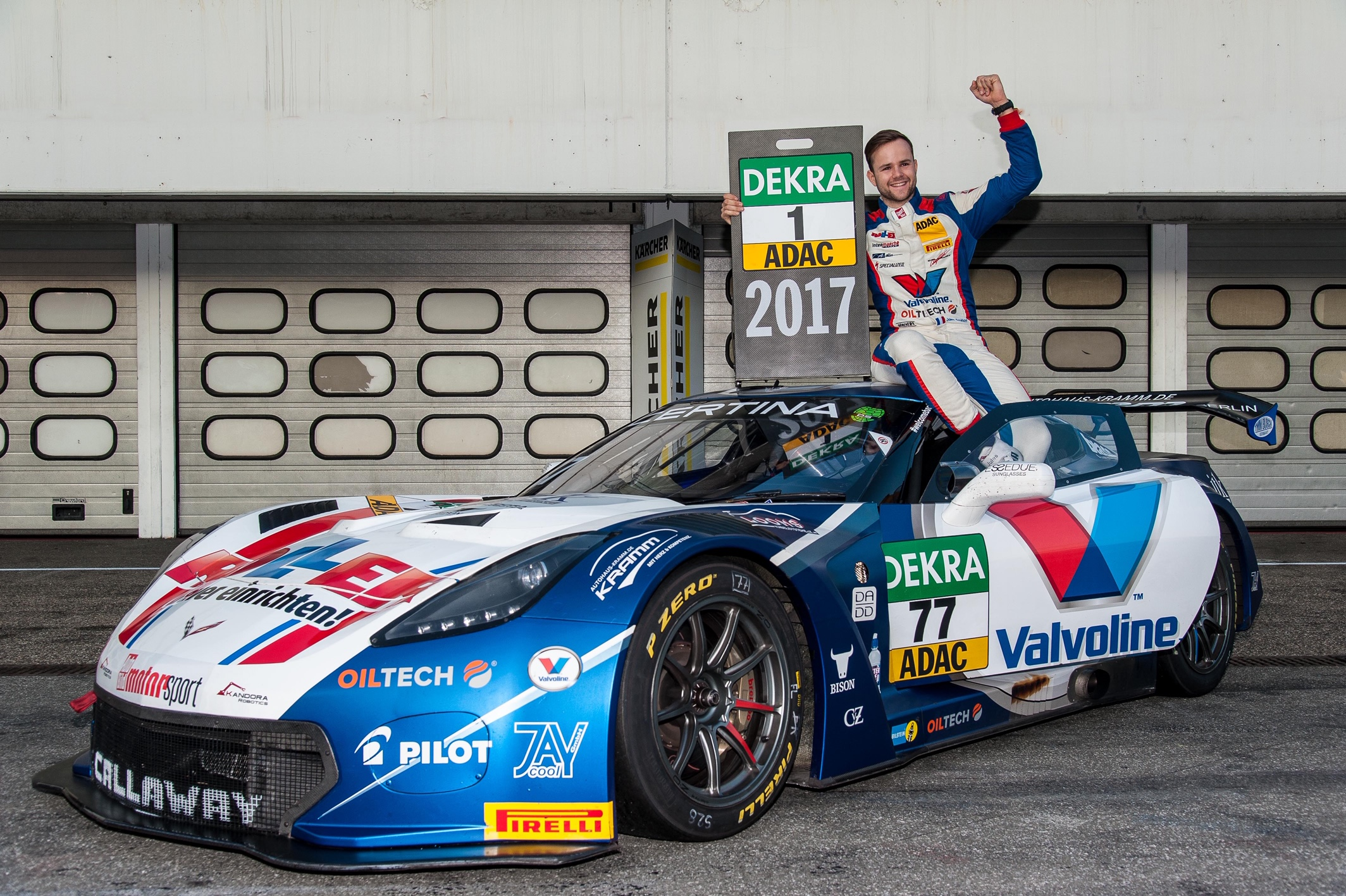 Jules Gounon célèbre son titre de champion des ADAC GT Masters en 2017 avec sa Corvette C7 GT3-R sur le Hockenheimring.